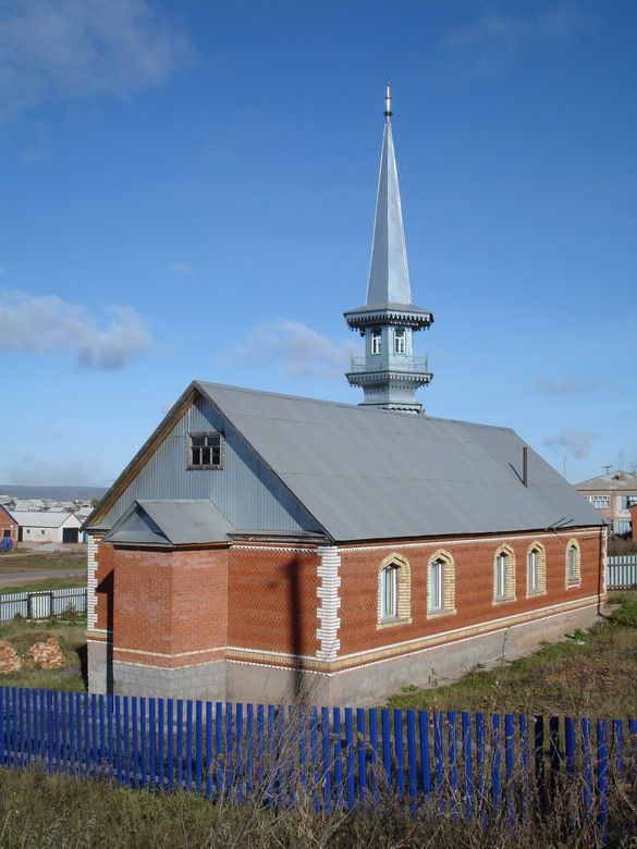 Мечеть в с. Северное, Оренбургская область, Россия